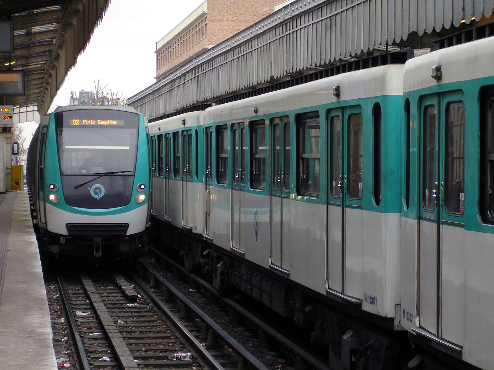 Station Jaurès de la ligne 2 du métro de Paris, France.